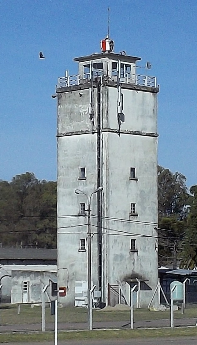 Rincón del Bonete - Faro Aéreo